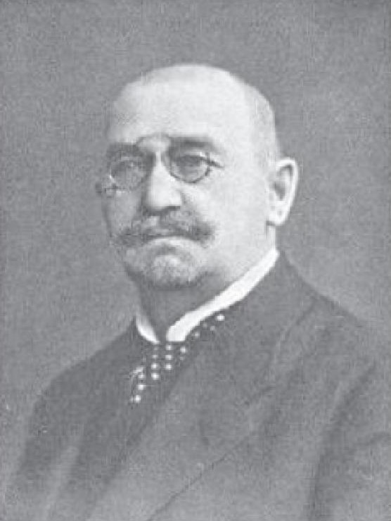 Josef Neumann (poslanec říšské rady) 1852-1915, rakouský a český železniční inženýr a politik